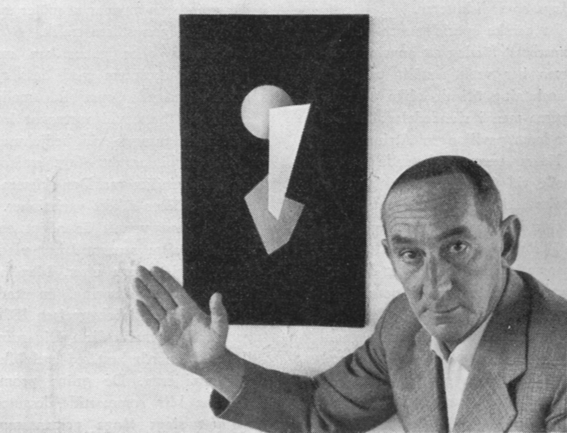 Formgivaren Wiwen Nilsson